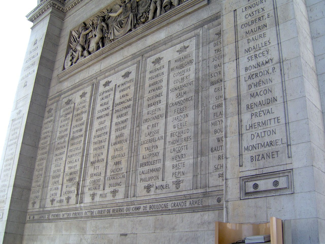 Arc de Triomphe